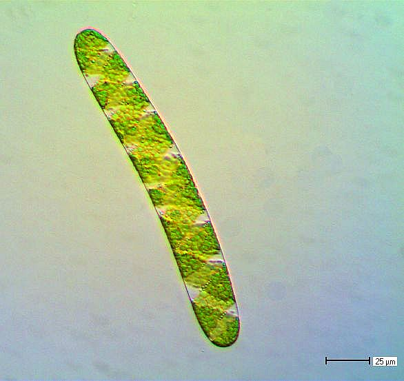 Spirotaenia condensata BREB.